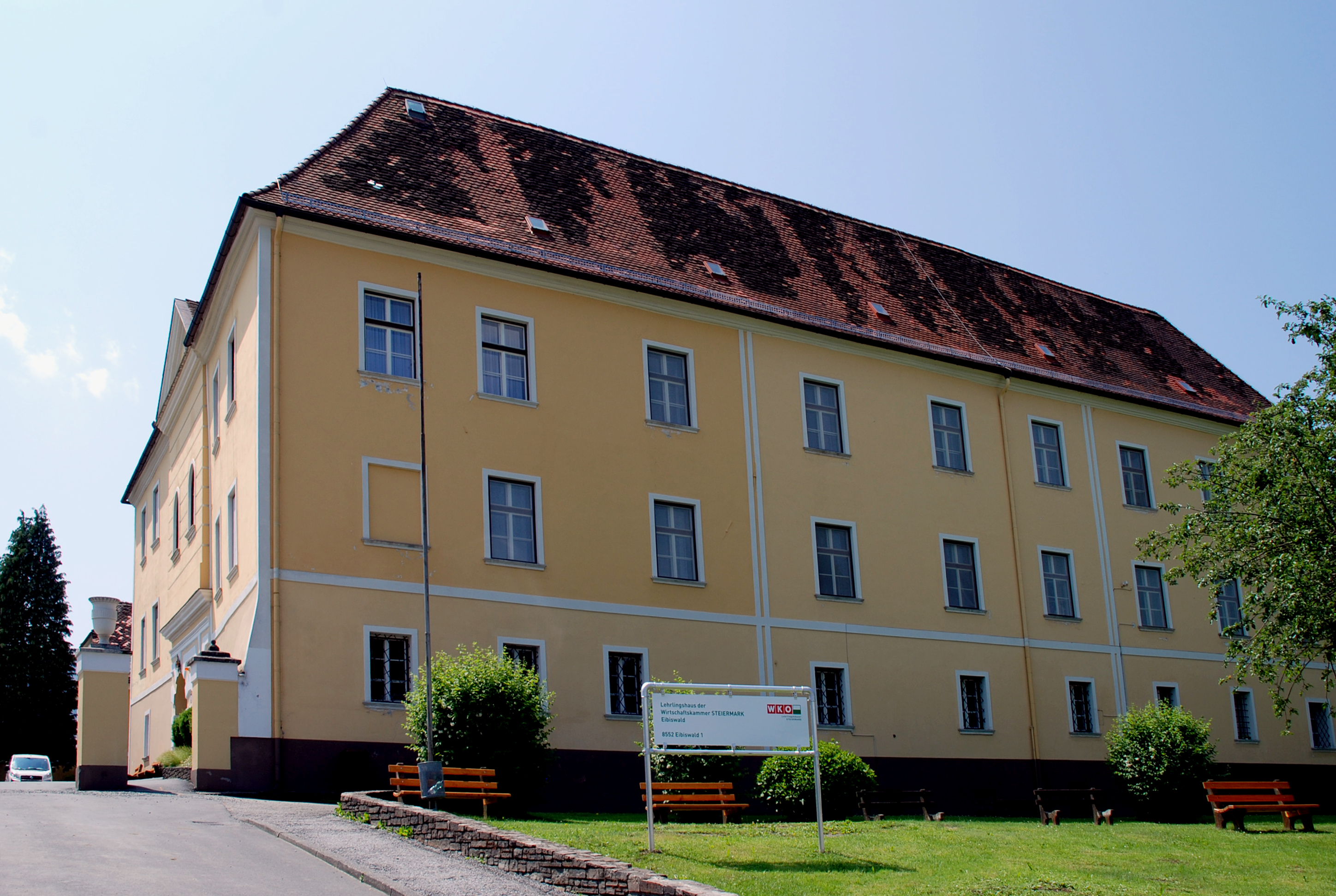 Eibiswald, Steiermark, Österreich: Schloss Hauptgebäude